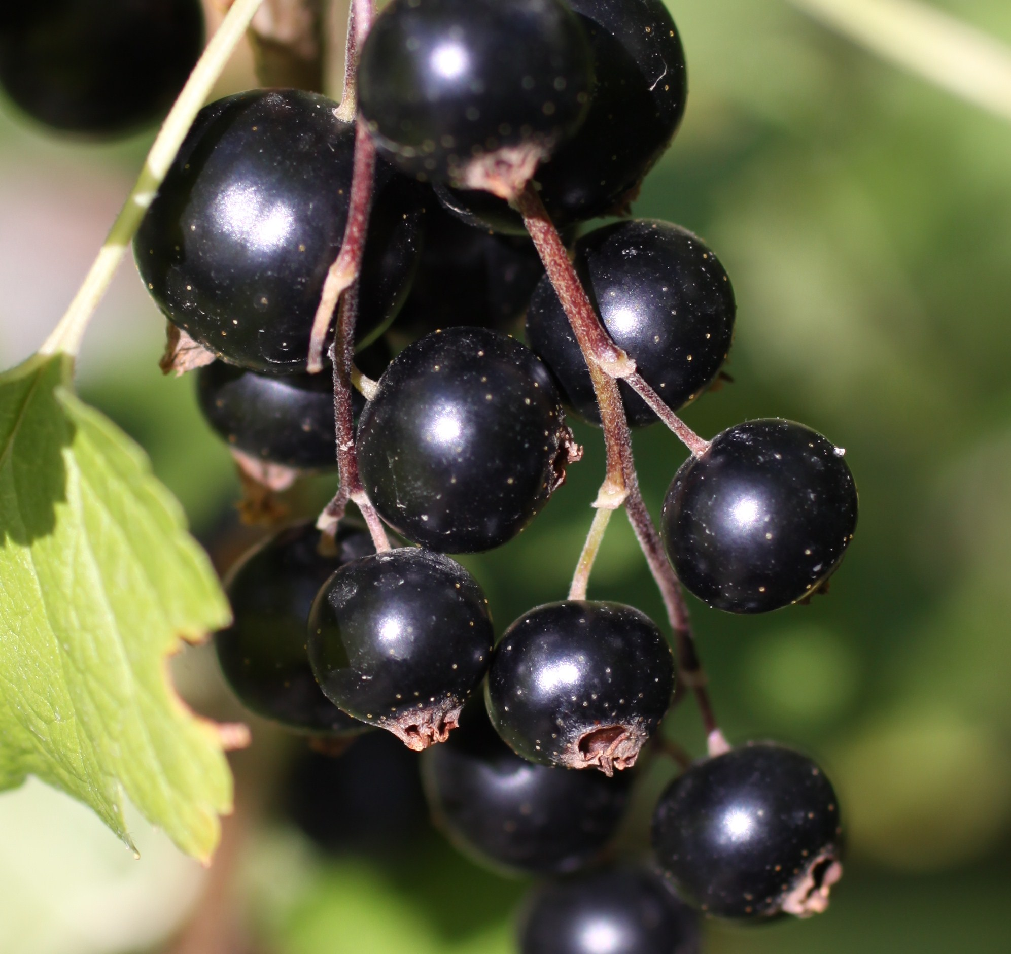 Un grappe de cassis mure. Photographie prise dans un jardin à La Rochelle (France).